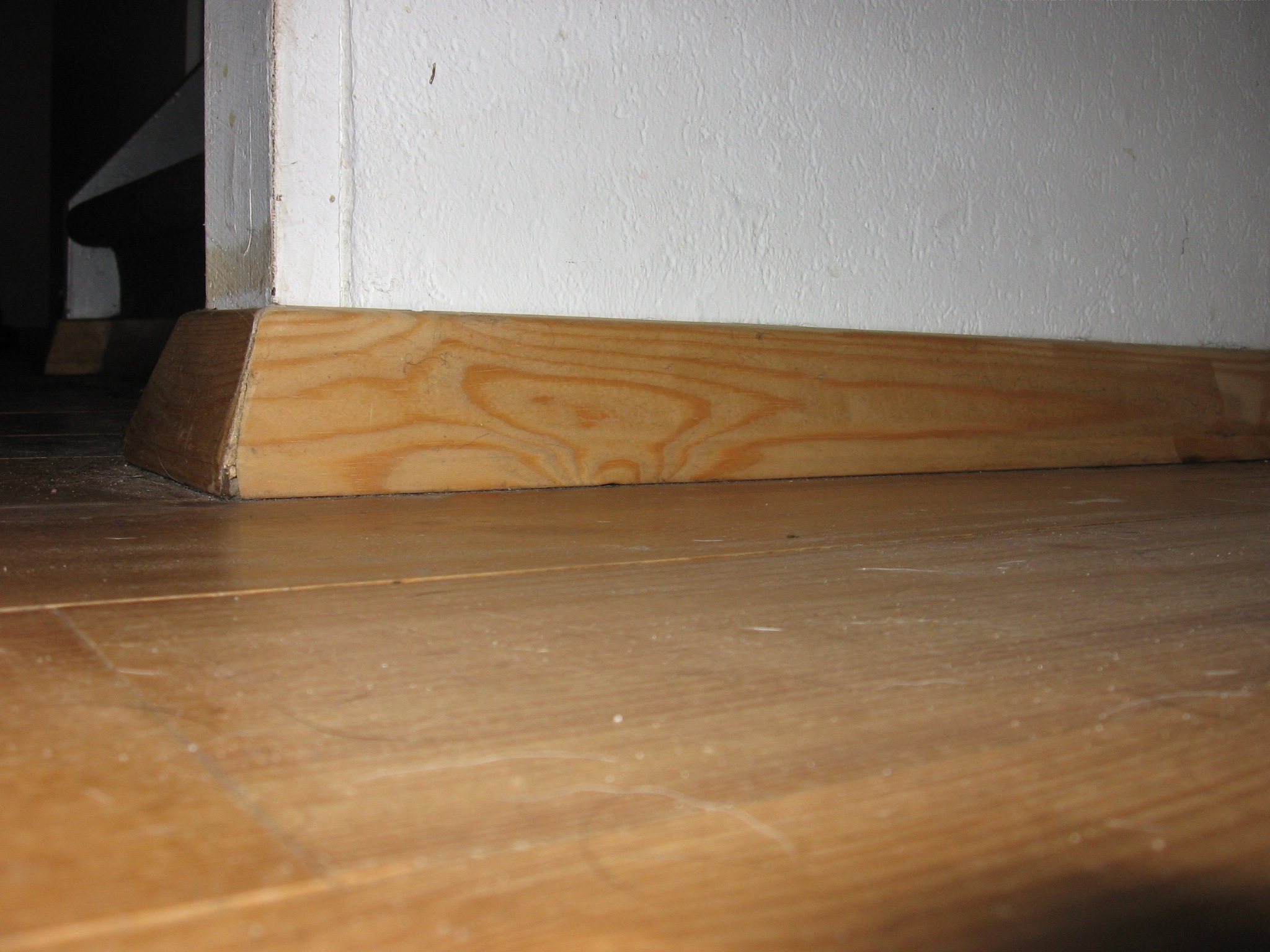 Plint